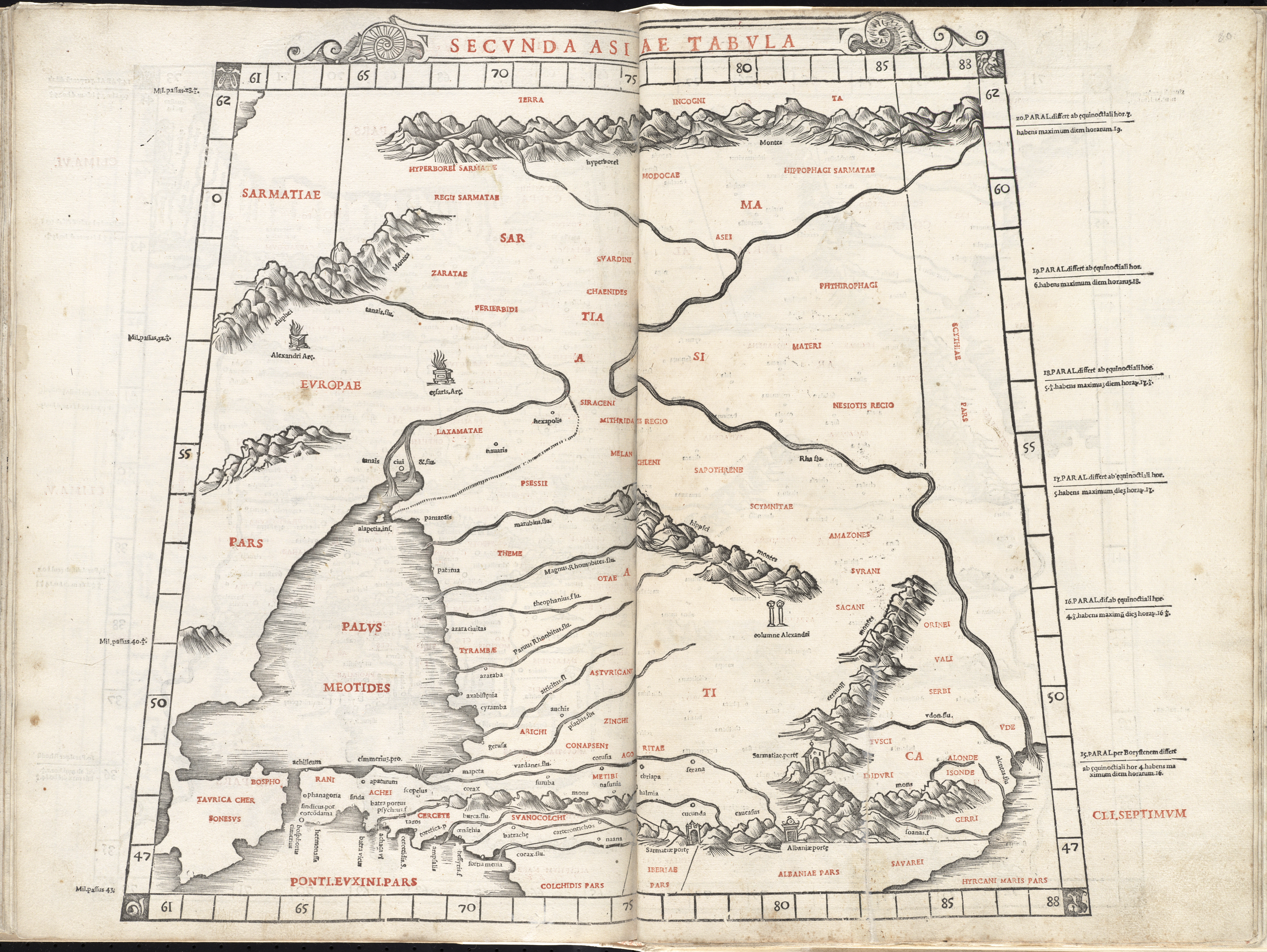 In secũda Tabula[:] Sarmatia Asiatica